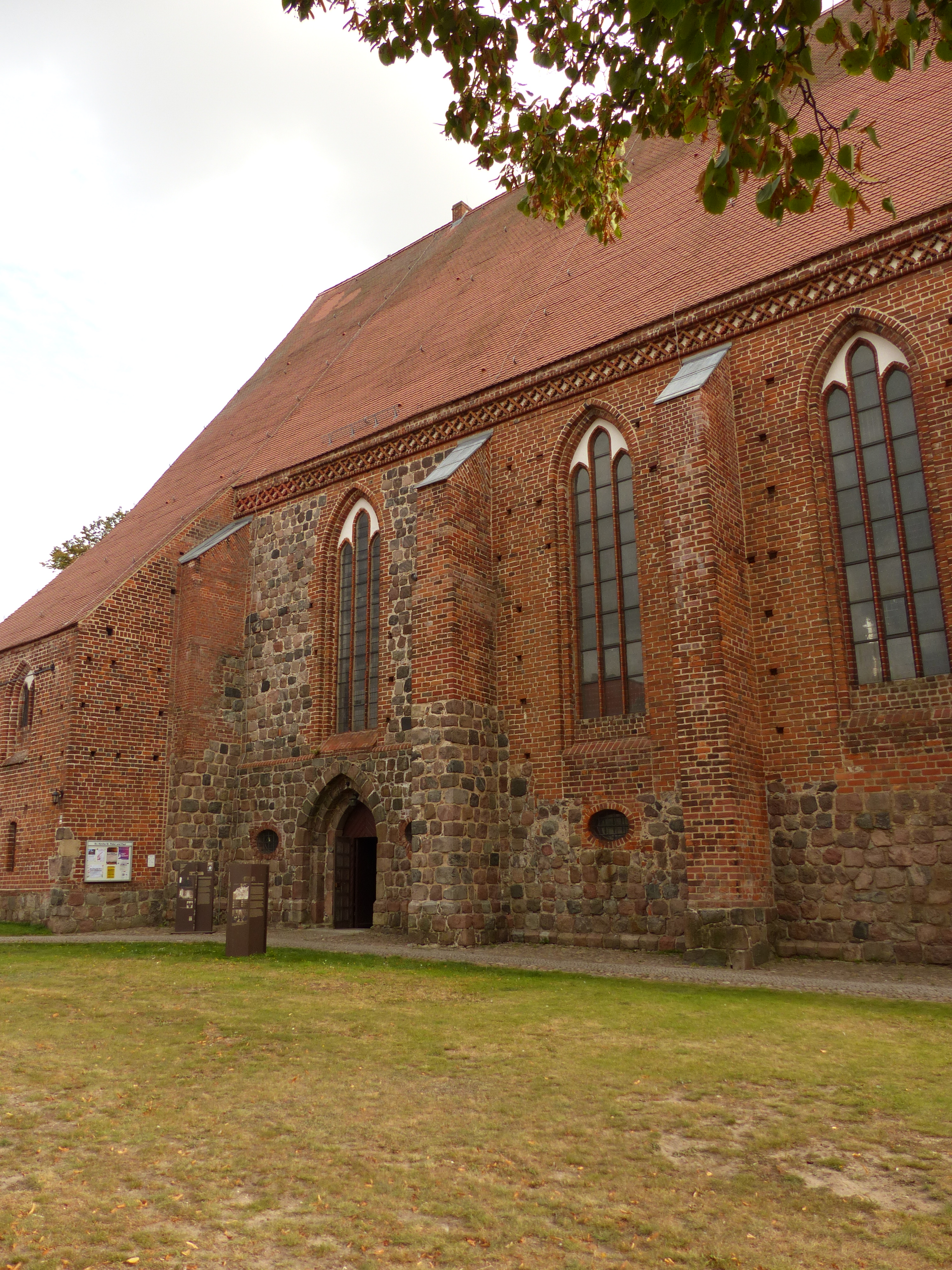 Wustergausen an der Dosse, Kirchenschiff Nordseite ostwärts mit gotischem Stufenportal aus Granitquadern